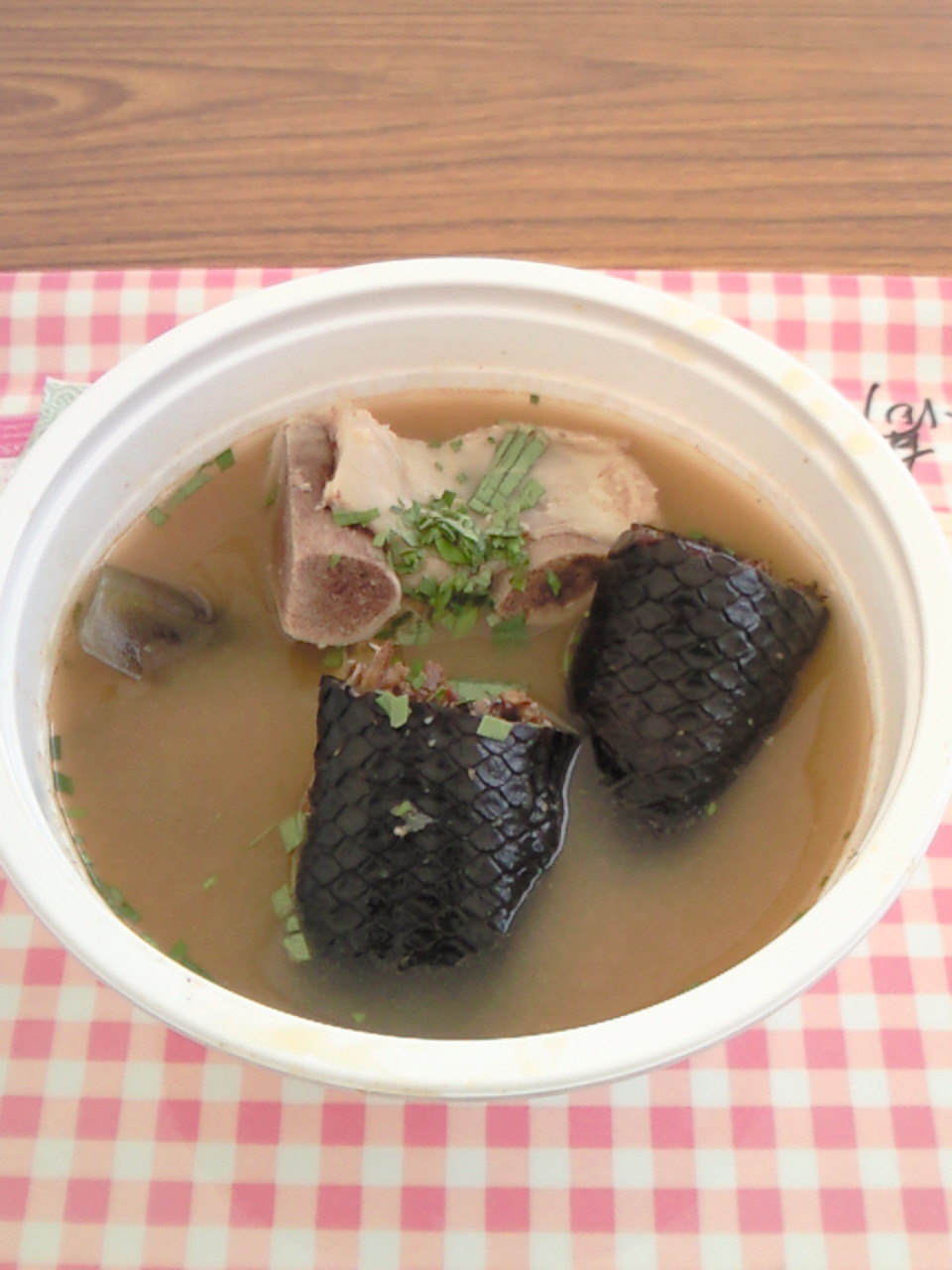 投稿者が撮影